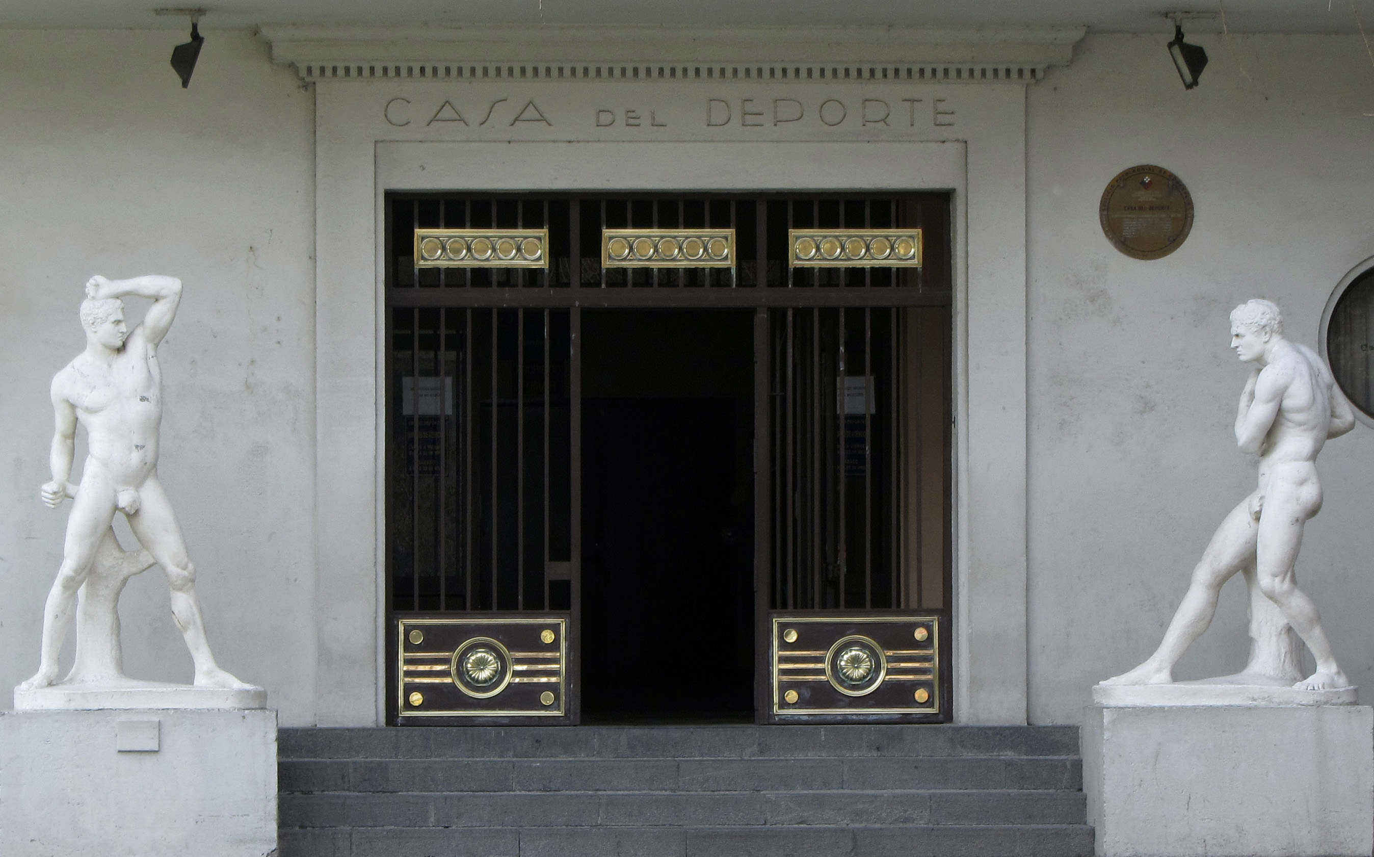 "Los Luchadores, Greugante y Damouceno. Anónimo." Casa del Deporte, Universidad de Concepción, Concepción, Chile, 2012